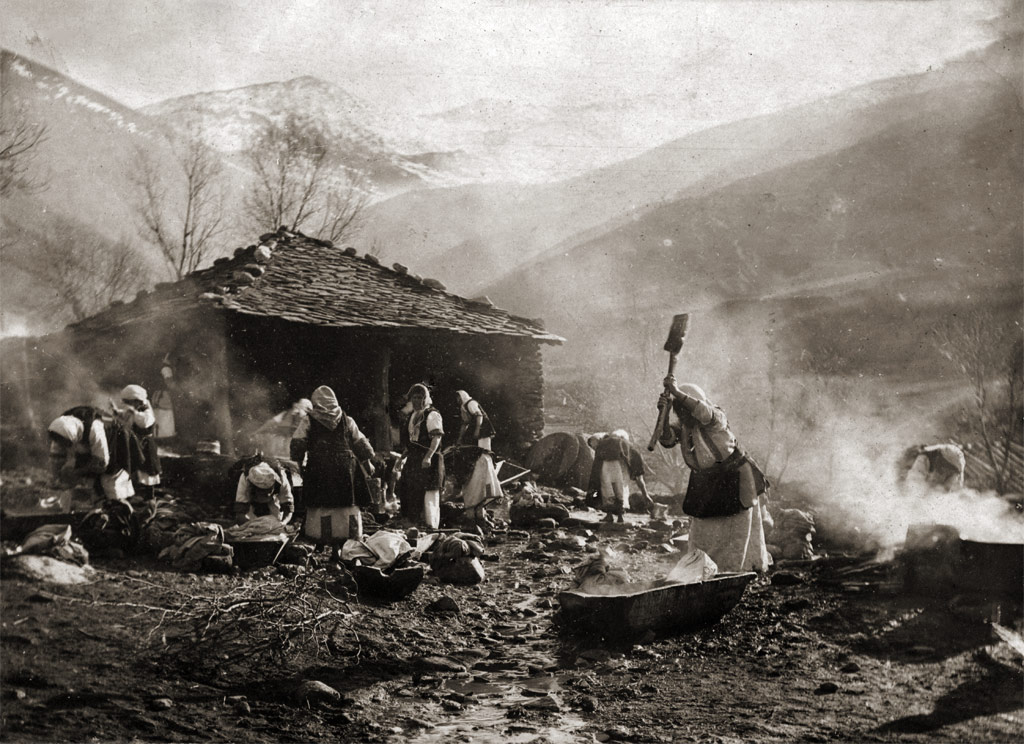 Жени перат на изворите до с. Прилепец, близу до Прилеп, Јужен фронт, 1918